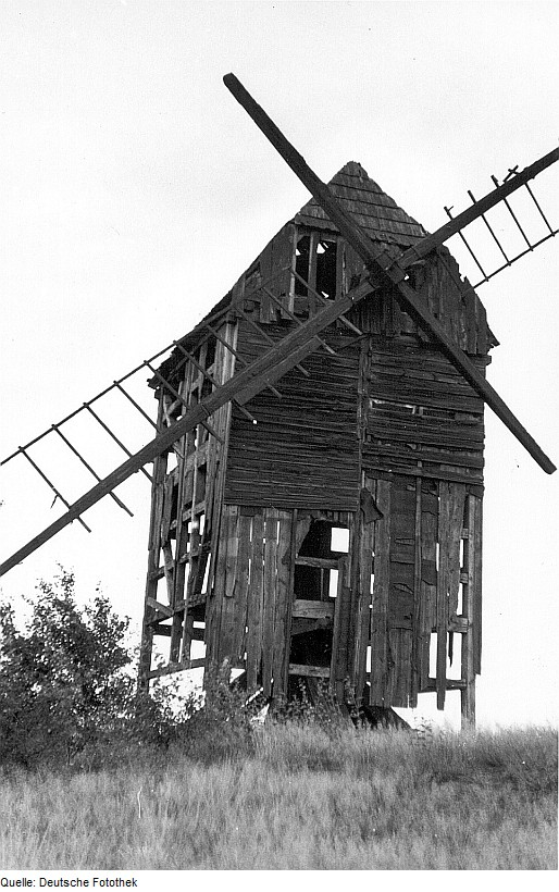 Original image description from the Deutsche Fotothek Krausnick-Groß Wasserburg-Krausnick. Bockmühle, ruinös